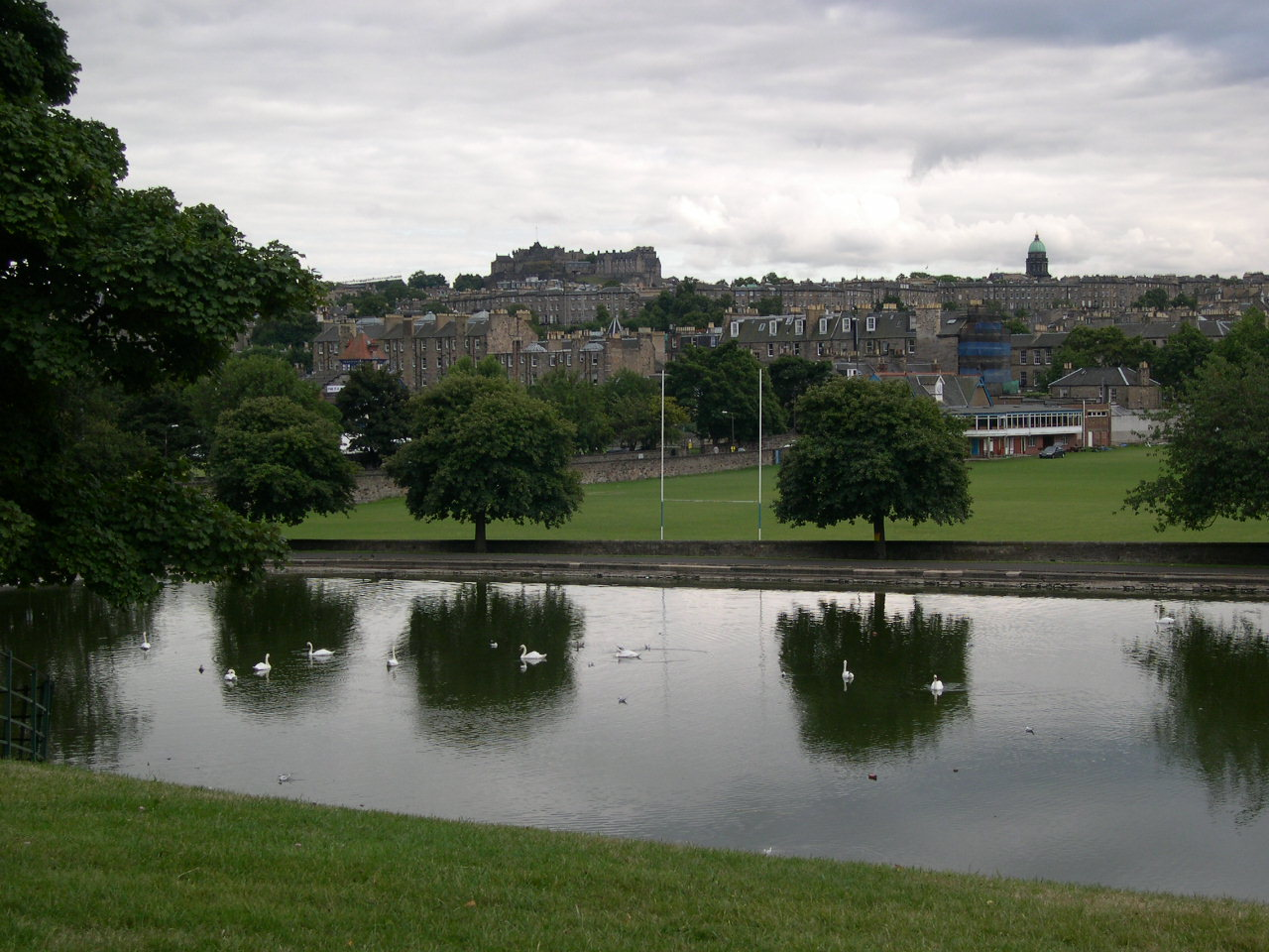 Uma vista do Castelo de Edimburgo, num dos parques da cidade. Francisco Miguel Rodrigues